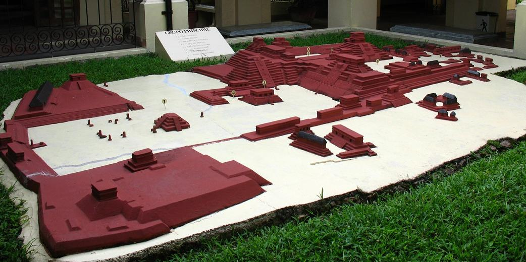 Maqueta del grupo principal de Copán expuesta a la entrada del sitio arqueológico